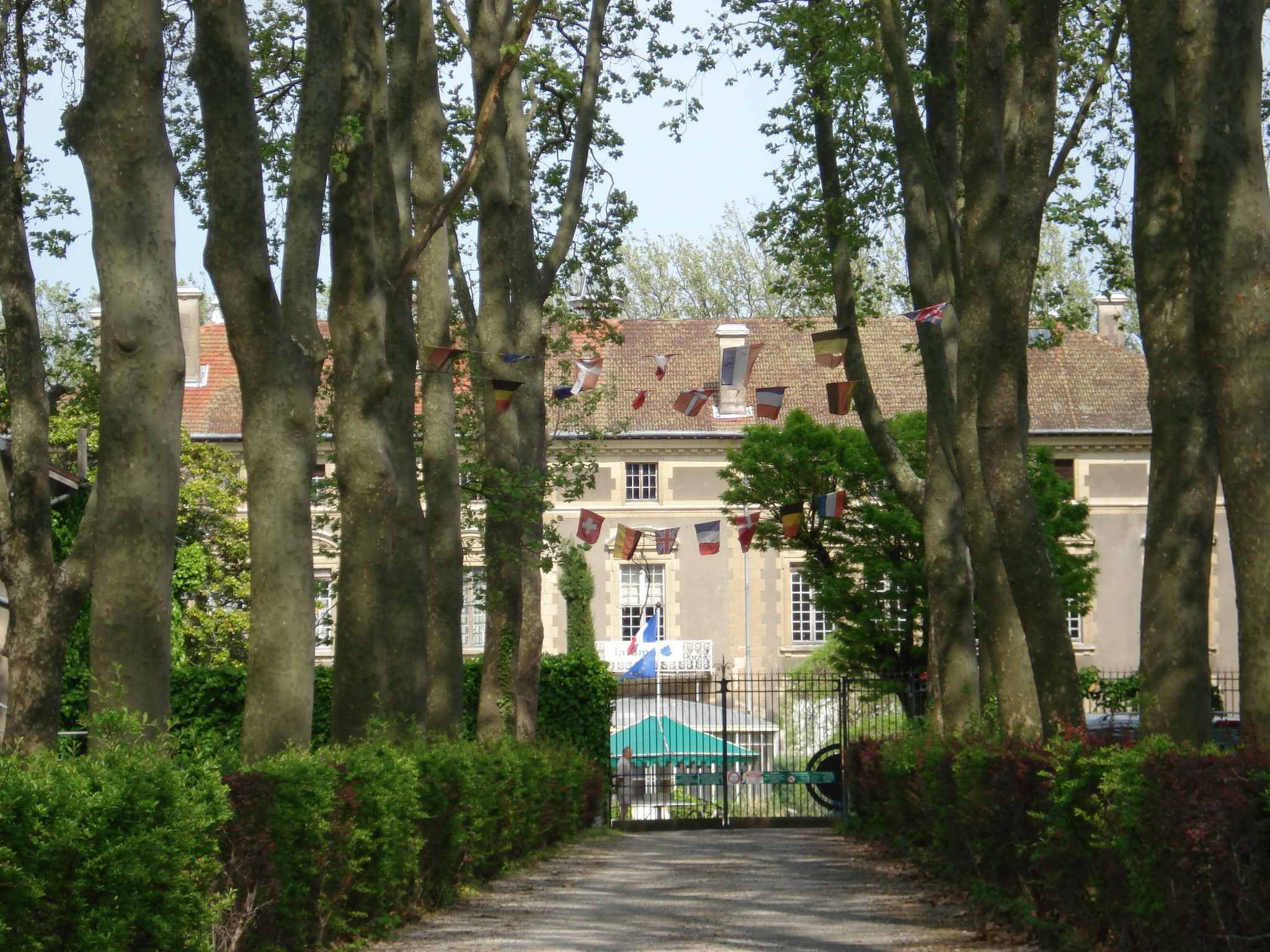 Château de la Pérouze à Saint-Sorlin-en-Valloire dans la Drôme